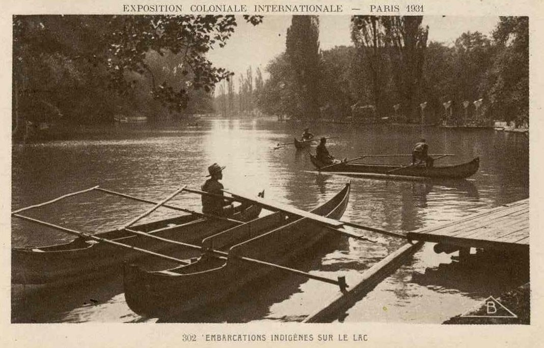 Les pirogues malgaches sur le lac Daumesnil à l'Exposition Coloniale de Paris en 1931